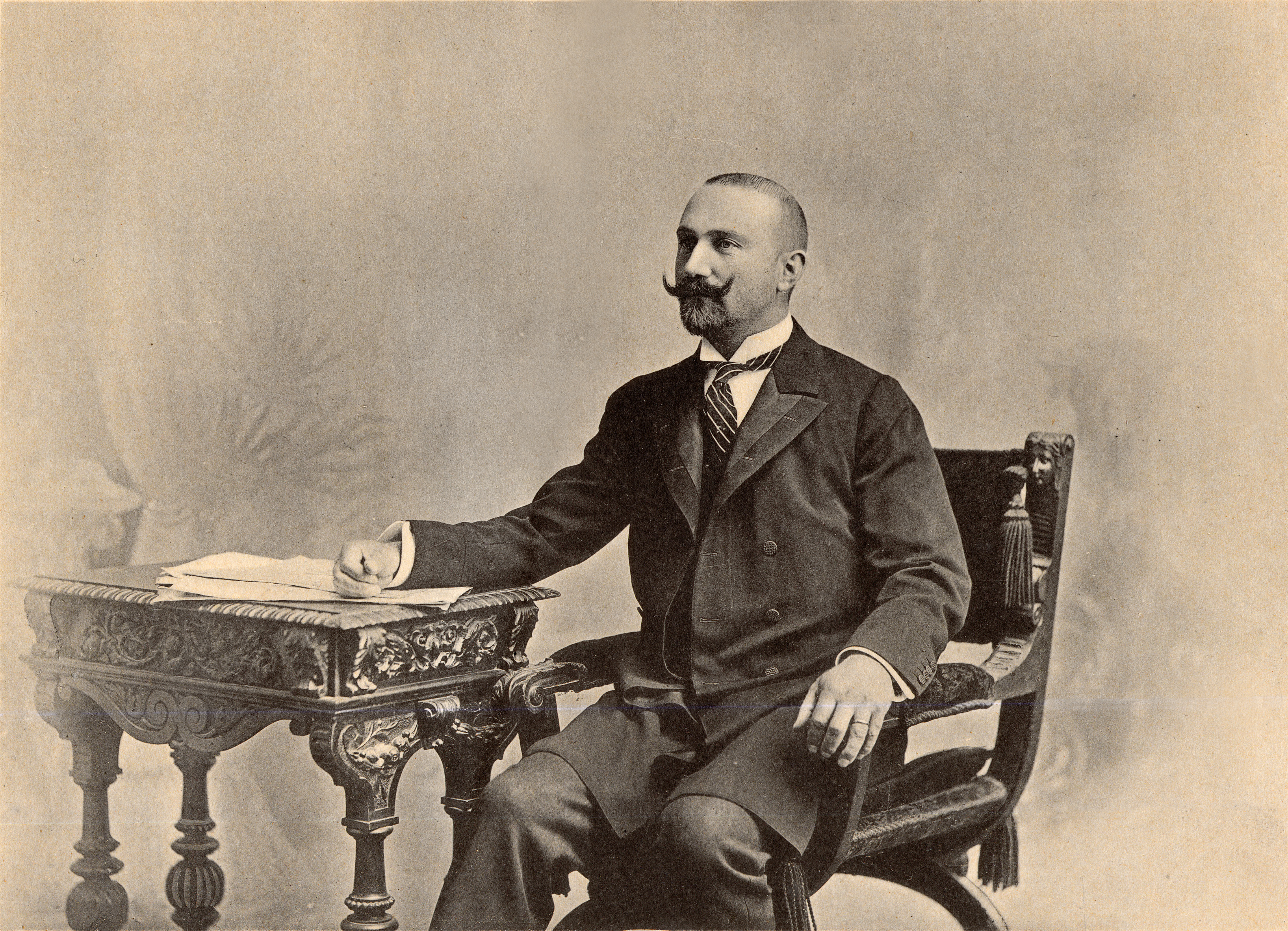 Prinz Konrad_zu_Hohenlohe-Schillingsfürst